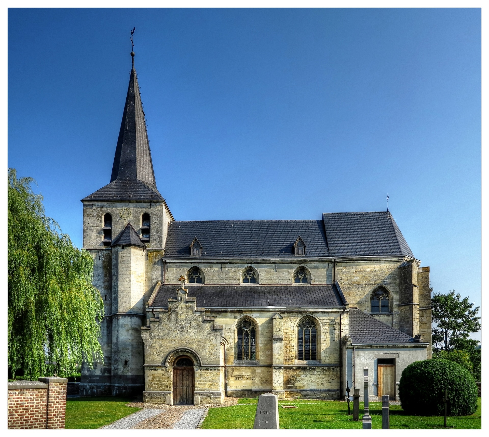 St Aldegondiskerk van As